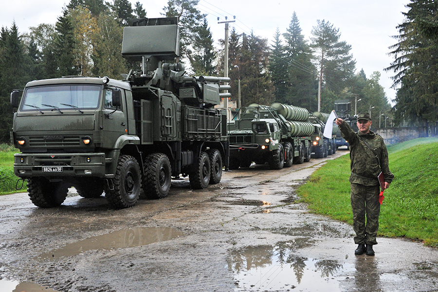 Учение с зенитным ракетным полком 1-й армии ПВО и ПРО особого назначения Воздушно-космических сил (ВКС) России.